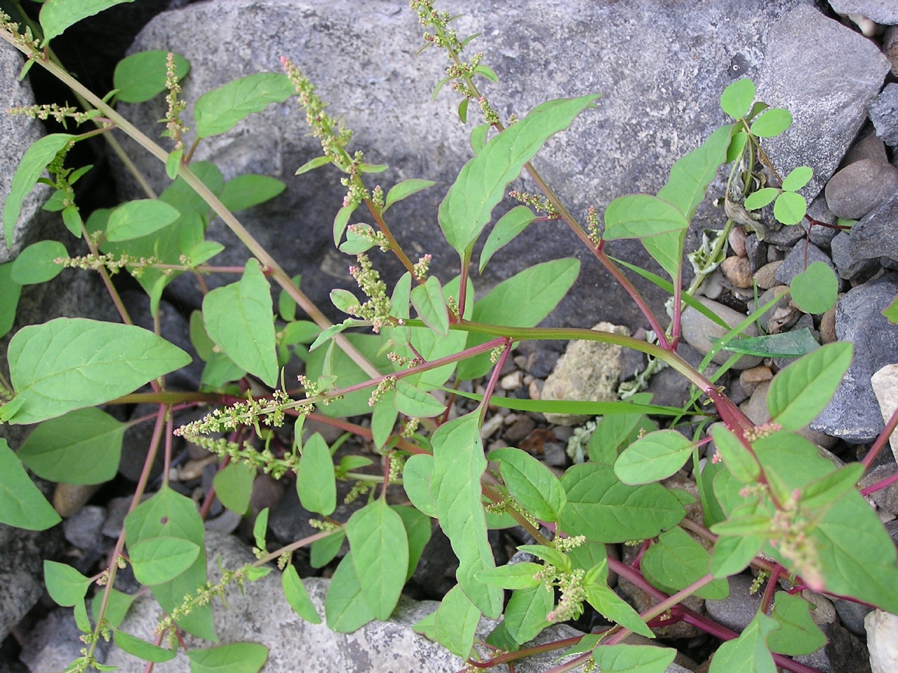 Chenopodium polyspermum am Bonner Rheinufer.